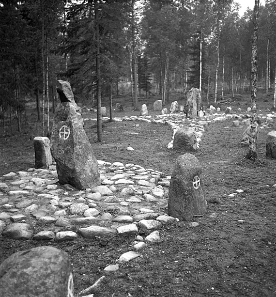 Flat stensättning med rest sten. Treuddig stensättning i bakgrunden. Motiv: Nässjö 23:1 Nyckelord: Riksintressen Kategori: Stensättning, Gravfält Flat stensättning med rest sten. Treuddig stensättning i bakgrunden. Nässjö 23:1.